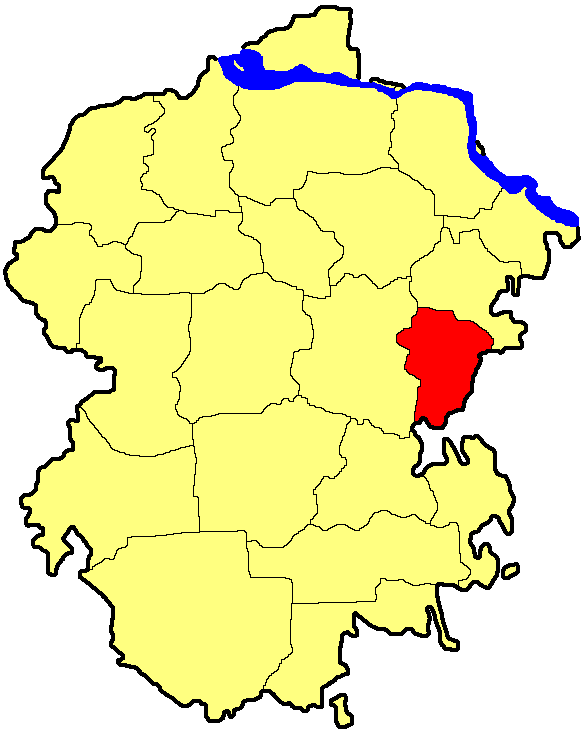 Янтицький район Чувашії